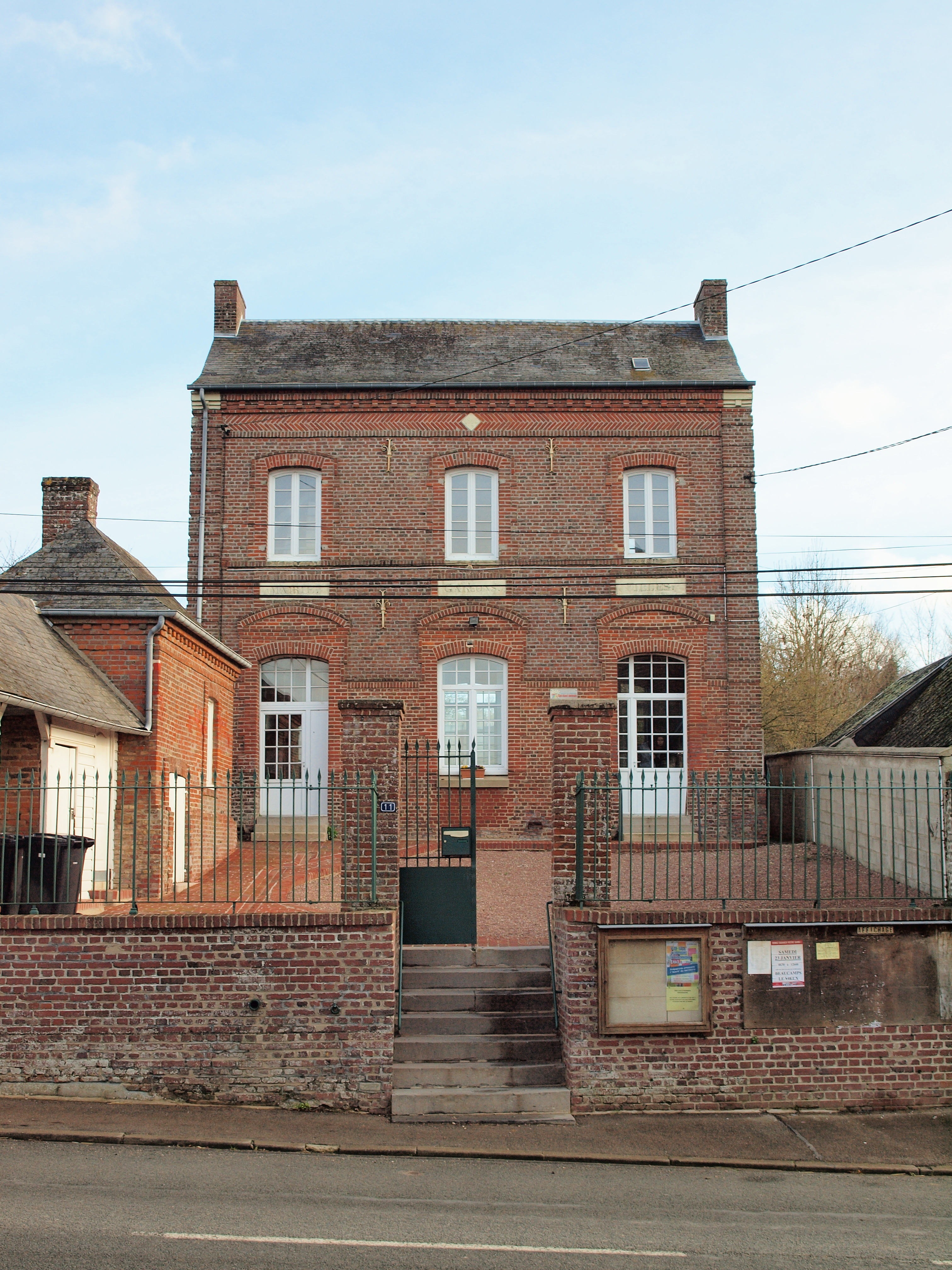 Saint-Germain-sur-Bresle (Somme, France)